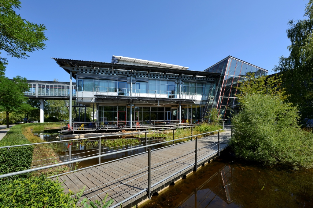 16.08.2013 Truma Gebäude, Fotonachweis: Hans Lippert